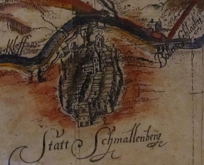 Auszug Jagdgrenzkarte (Grenzen Landt und Jagtt der Herren Graffen von Wittgenstein und Berleburg), Erbvodey Graffschafft und Gericht Oberkirchen, Anno 17. Nouembris 1653 (Germany)